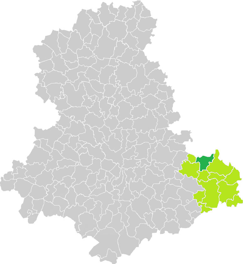 Carte de situation de la commune de Saint-Julien-le-Petit (en vert foncé) dans le votre Canton (en vert clair) sur une carte des communes de la Haute-Vienne